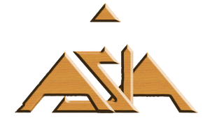 Logo del gruppo musicale Asia